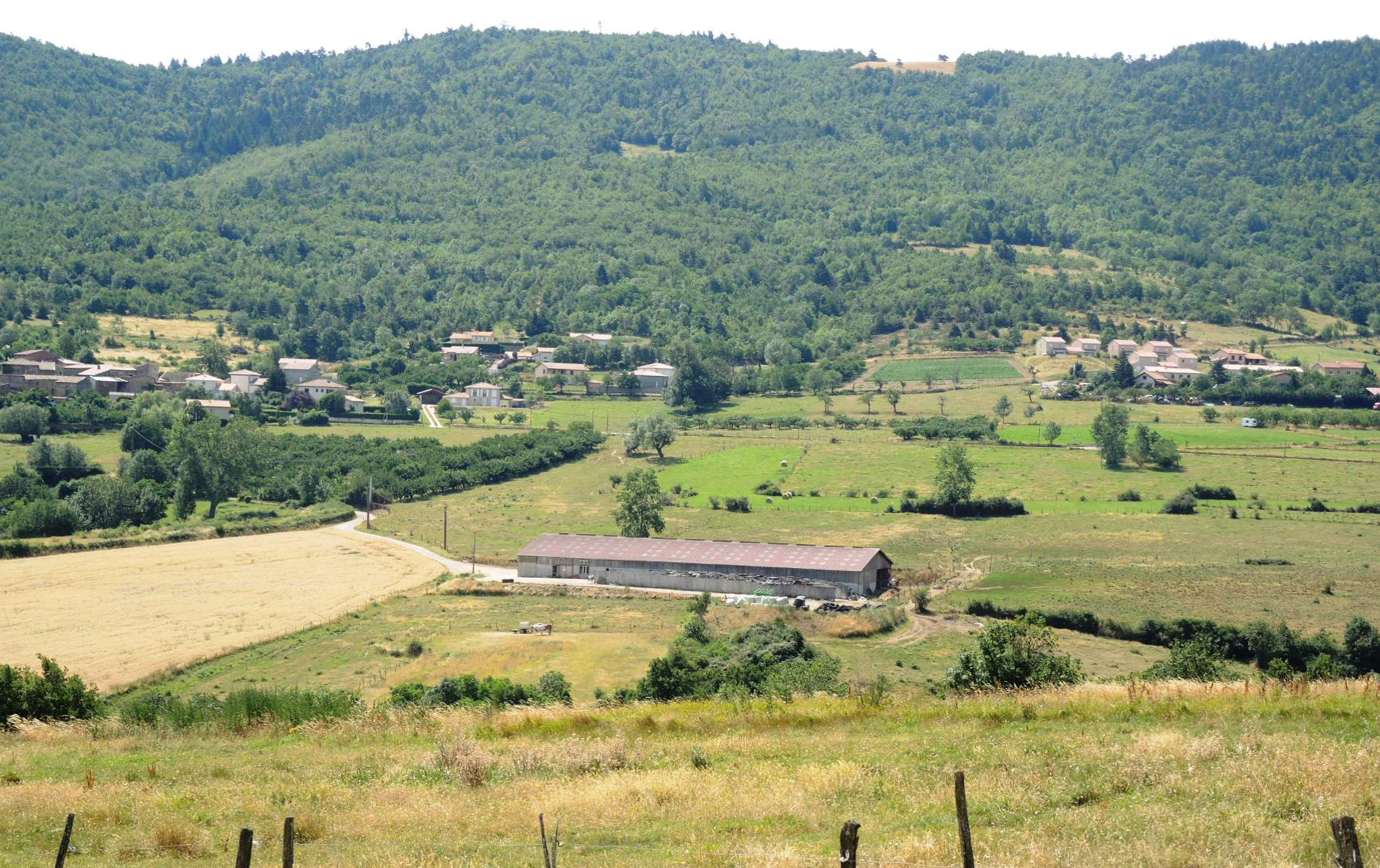 Saint-Jacques-d'Atticieux détail